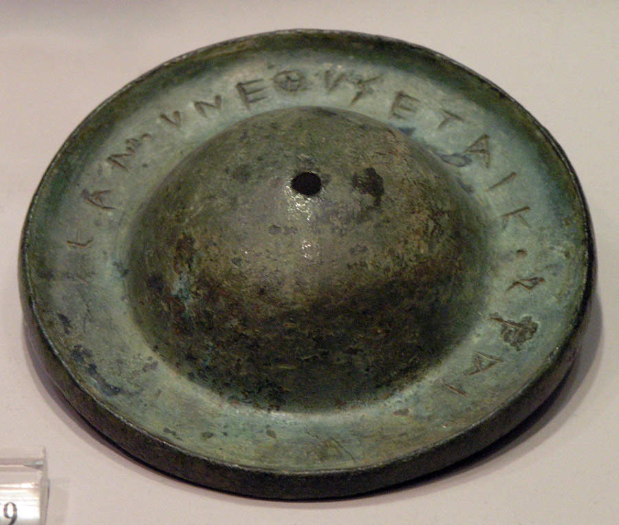 Cymbale en bronze de Grèce antique, avec inscription indiquant qu'elle fut dédiée par Kamo à Korè, vers 500-480 av. J.-C. Provenance inconnue. Musée national archéologique d'Athènes, n° 7959. Texte: ΚΑΜΟΥΝΕΘΥΣΕΤΑΙΚΟΡϜΑΙ.